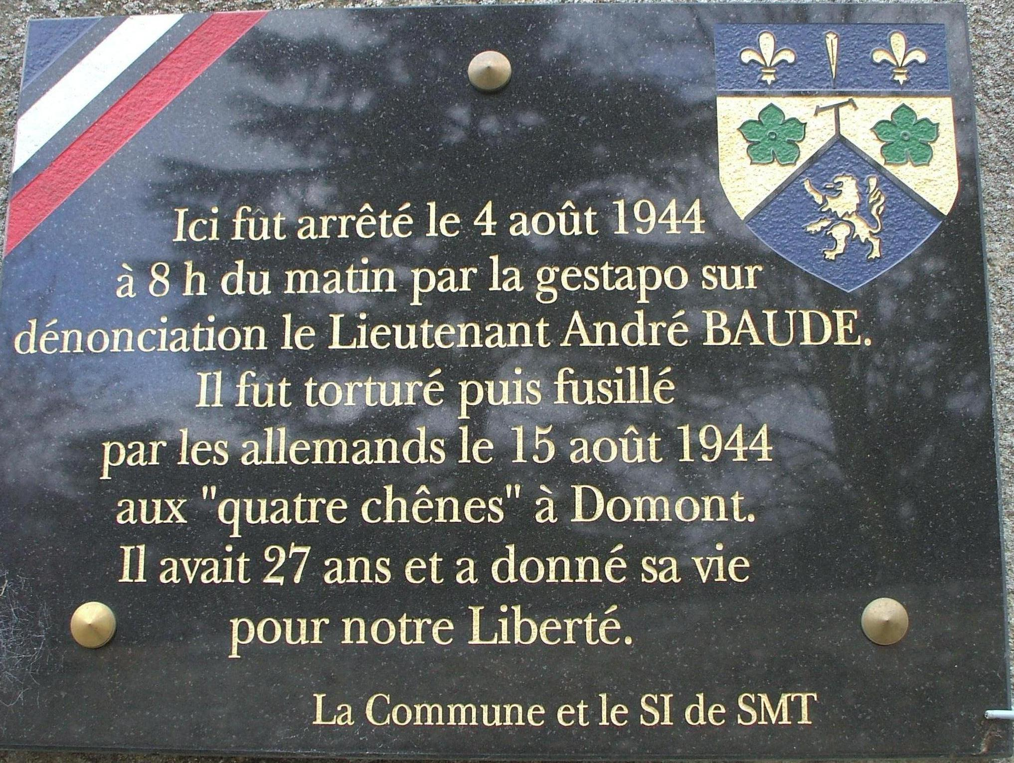 plaque commemorative André Baudé st martin du tertre val d'oise